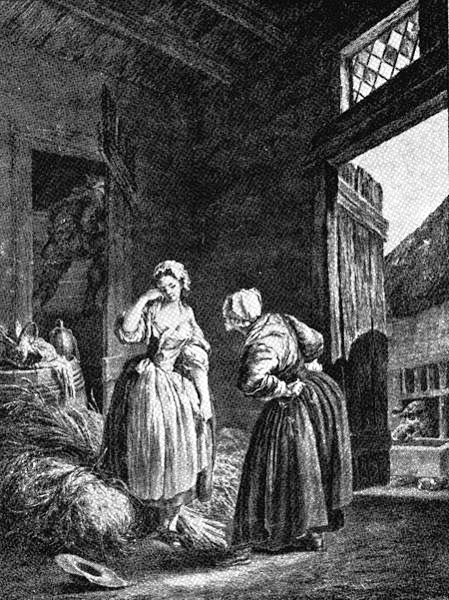 Gravure ayant inspiré Baidouin pour concevoir le ballet de la fille mal gardée